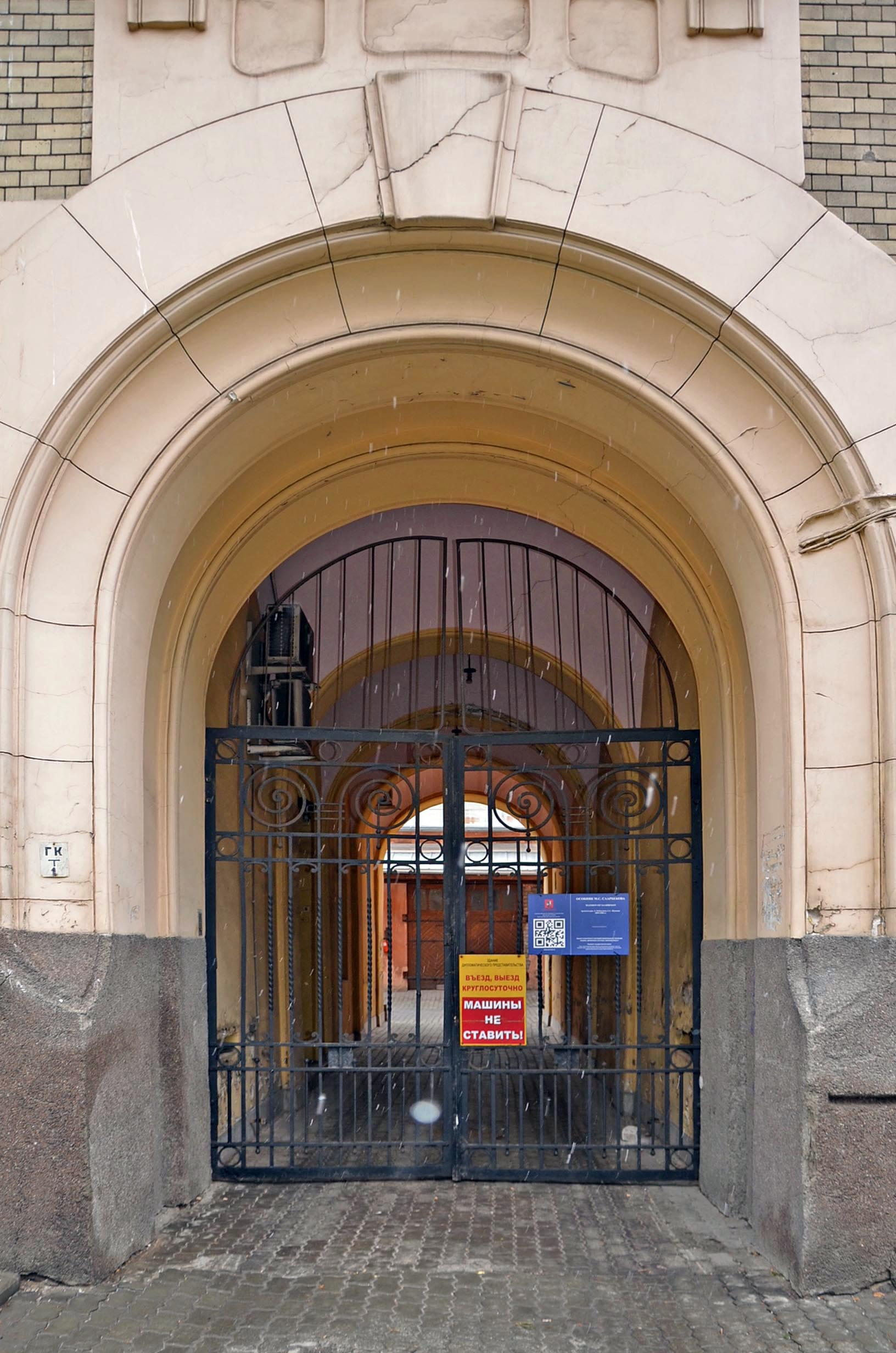 Проездная арка в особняке М. С. Саарбекова на Поварской улице в Москве